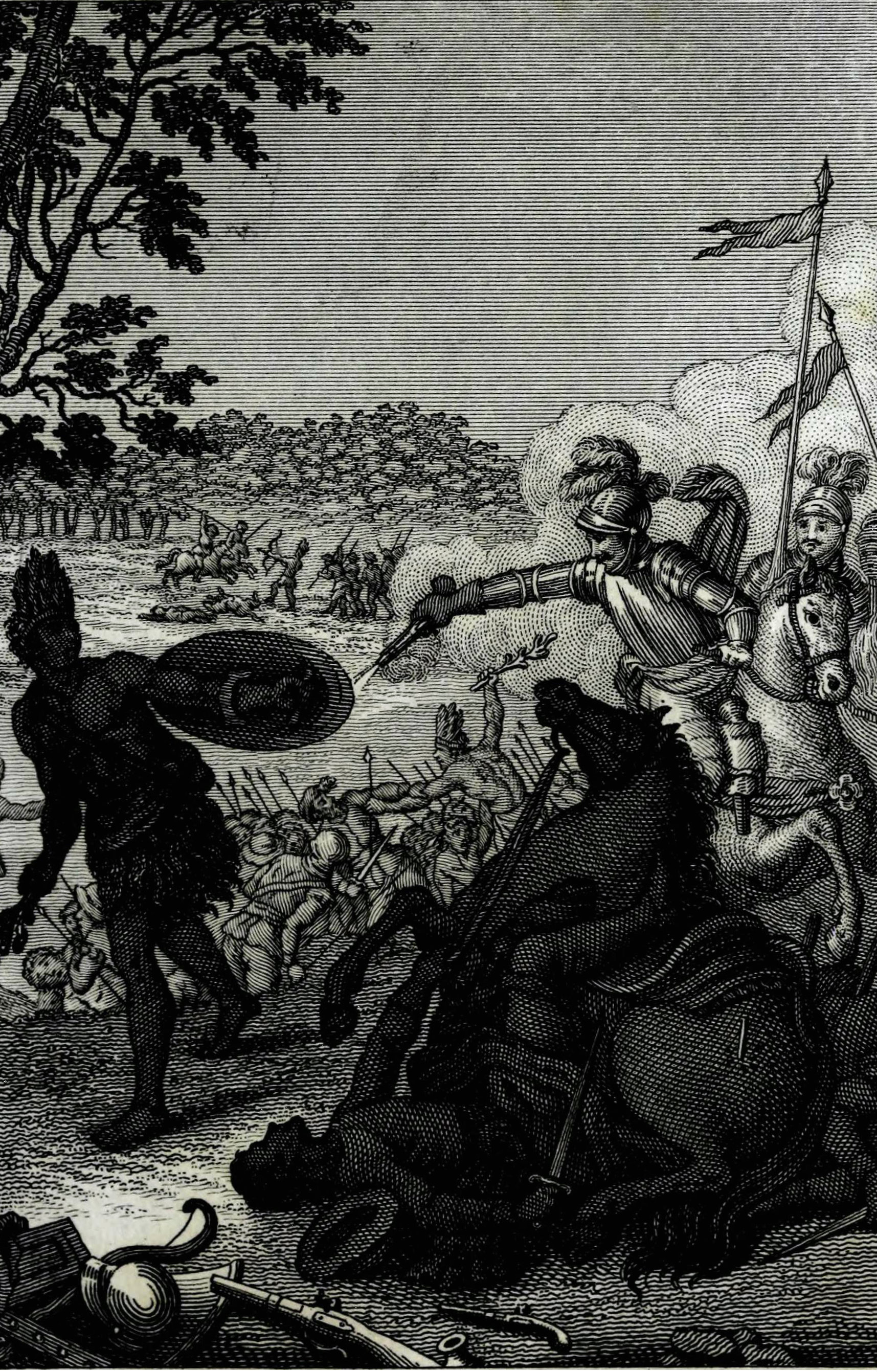 T.I Canto III. Valdivia ataca a los Araucanos